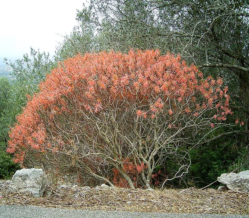 Euphorbia dendroides Puig de Santa Magdalena close to Inca, Mallorca, Spain